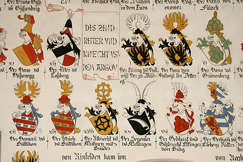 In der Schlachtkapelle von Sempach